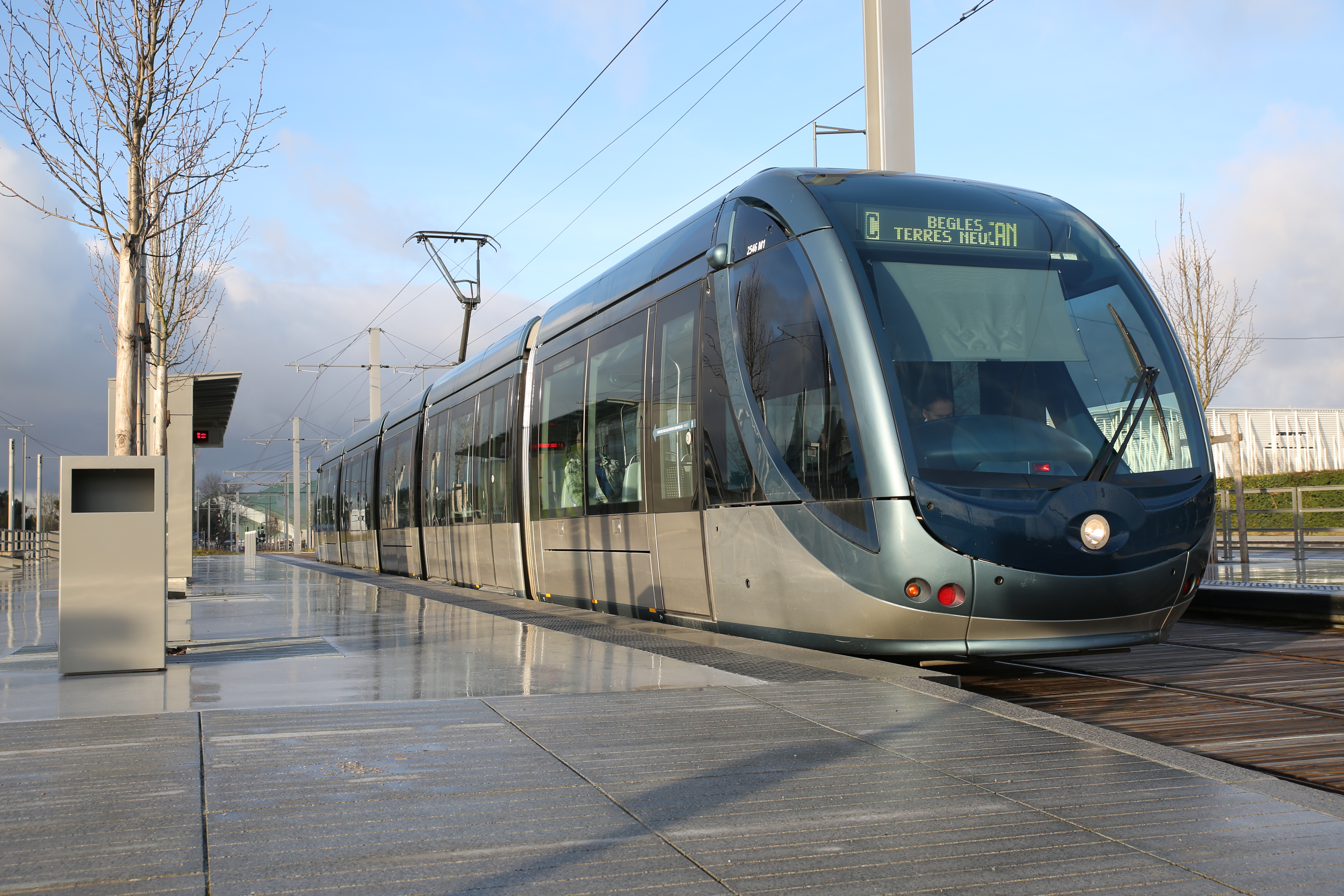 Tram au départ de la nouvelle station Parc des Expositions - Stade.